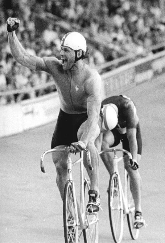 Michael Hübner, Bill Huck Information added by Wikimedia users.ADN-ZB Kluge 24.6.89 Cottbus-DDR-Meisterschaften im Bahnradsport - Neuer DDR-Meister im Sprint wurde Michael Hübner vom SC Karl-Marx-STadt. Im Finale besiegte er den Berliner Dynamo-Fahrer Bill Huck (r.) in zwei Läufen.